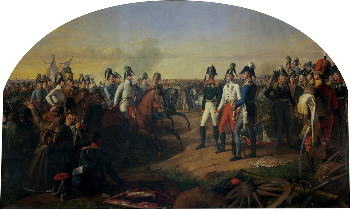 Siegesmeldung des Fürsten Karl Philipp zu Schwarzenberg an die verbündeten Monarchen Zar Alexander I. von Russland, Kaiser Franz I. von Österreich und König Friedrich Wilhelm III. von Preußen (von links nach rechts) in bzw. nach der Völkerschlacht bei Leipzig am 19. Oktober 1813, Gemälde von Johann Peter Krafft (1780-1856).